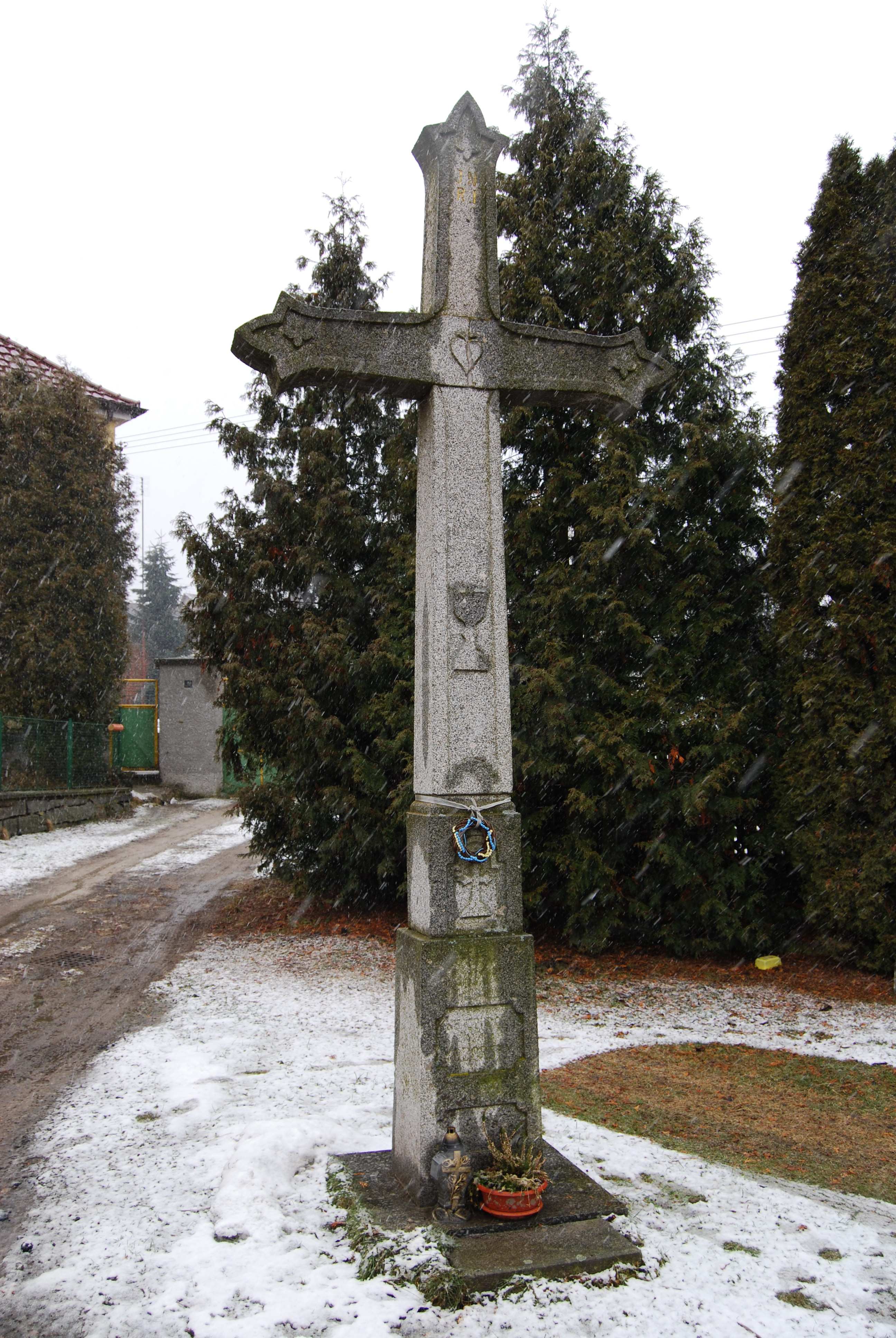 Kříž přímo v obci. Kozárovice. Okres Příbram. Česká republika.